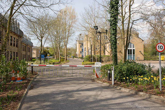 Stoneham Park